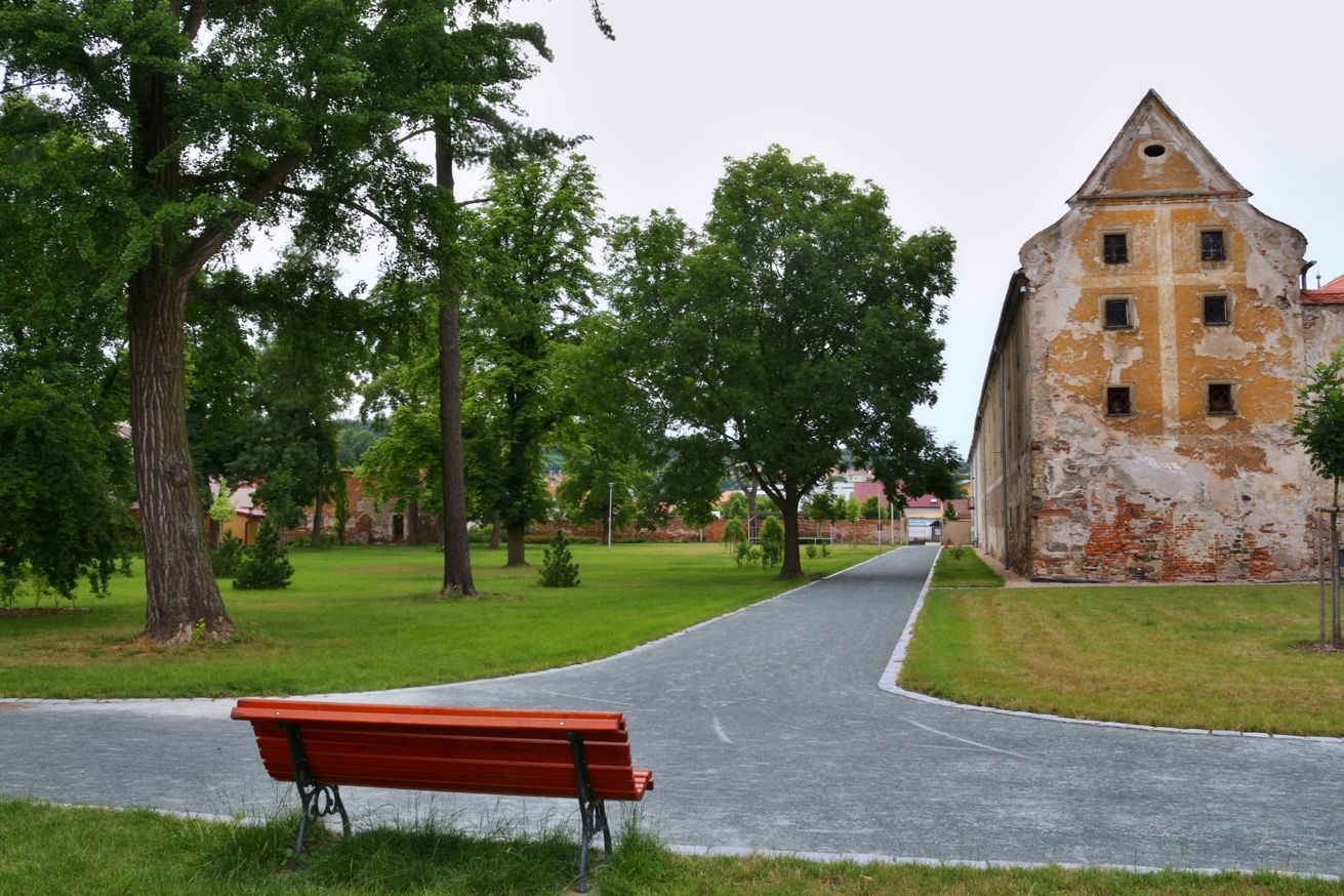 Zámek Oslavany